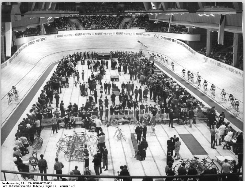 Berlin, Werner-Seelenbinder-Halle, Radrennbahn Zentralbild Kutscher 9-2-70 Berlin: Winterbahnrennen-Blick in die Werner-Seelenbinder-Halle während des 100-Runden-Punktefahren am 8.2.1970.